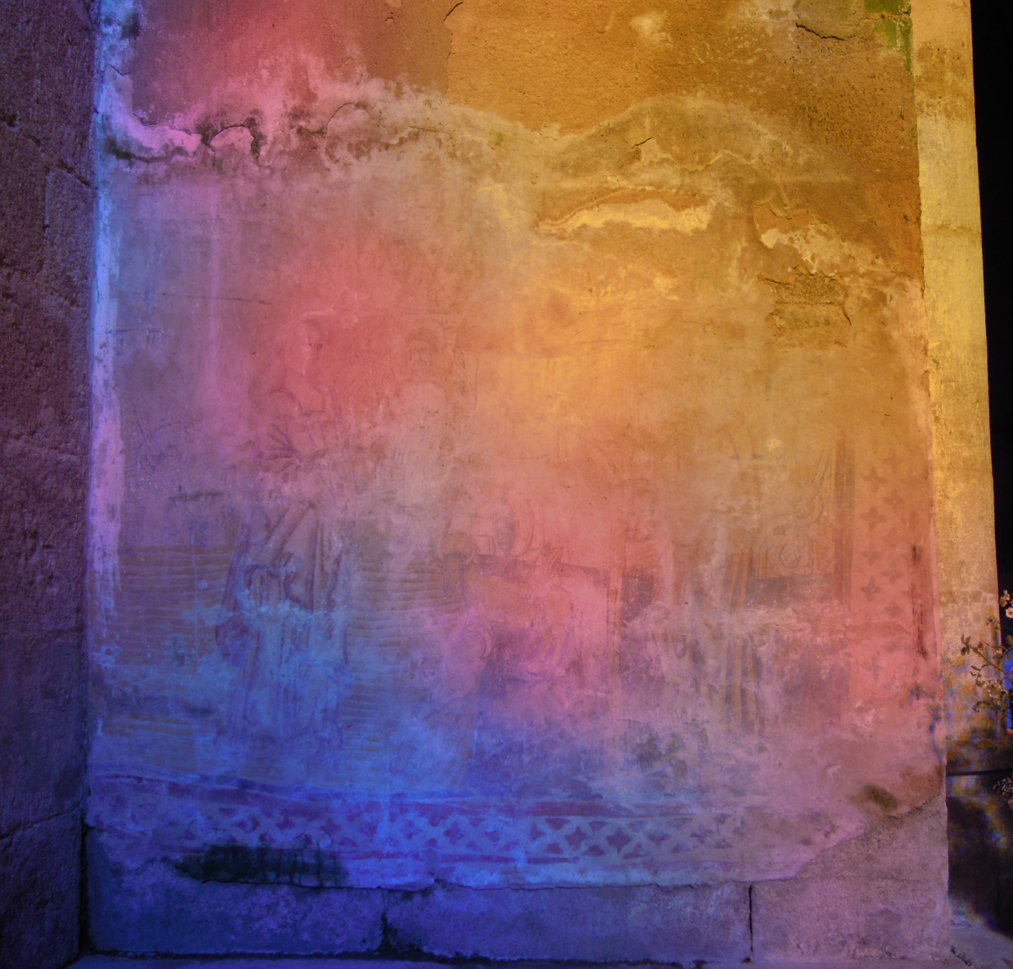 Fresco na igrexa de Santo Estevo de Ribas de Miño, representando o nacemento do neno Xesús Cristo.